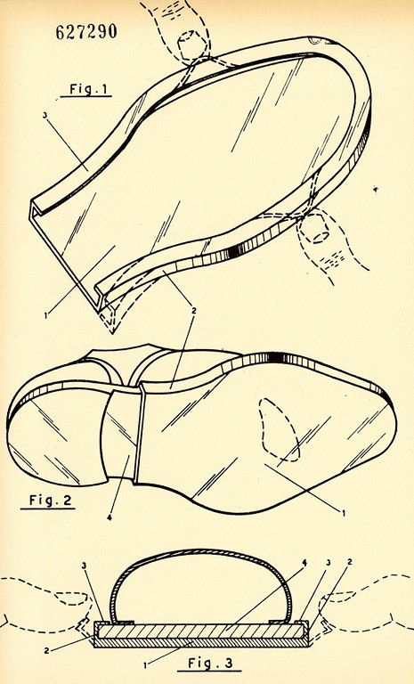 Disegno per il brevetto per invenzione industriale n. 627290, classe A 43 b, di Pierluigi Fioretti per una mezza suola di applicazione istantanea per calzature, Godoy Cruz (Menodza, Argentina). Data di deposito: 25 marzo 1960. Data di concessione: 28 ottobre 1961 (AS Genova, Ufficio provinciale industria, commercio e artigianato di Genova, Fondo Brevetti)